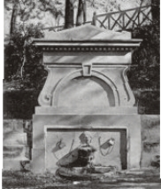 Фонтан грека Апостола Савопуло в начале 20 века